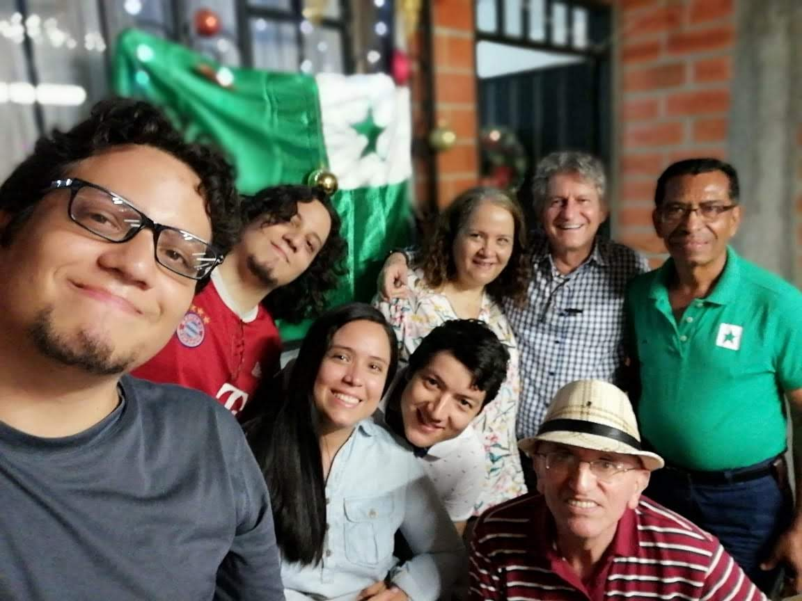 La kaliaj esperantistoj kuniĝis por festi la tagon de Zamenhof en 2018 Esta fotografía fue tomada en el municipio colombiano con código Esta fotografía fue tomada en el municipio colombiano con código 76001. .